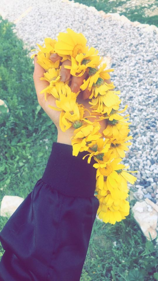 صورة للأزهار التي تباع للسائحين في منطقة عراق الأمير في الاردن